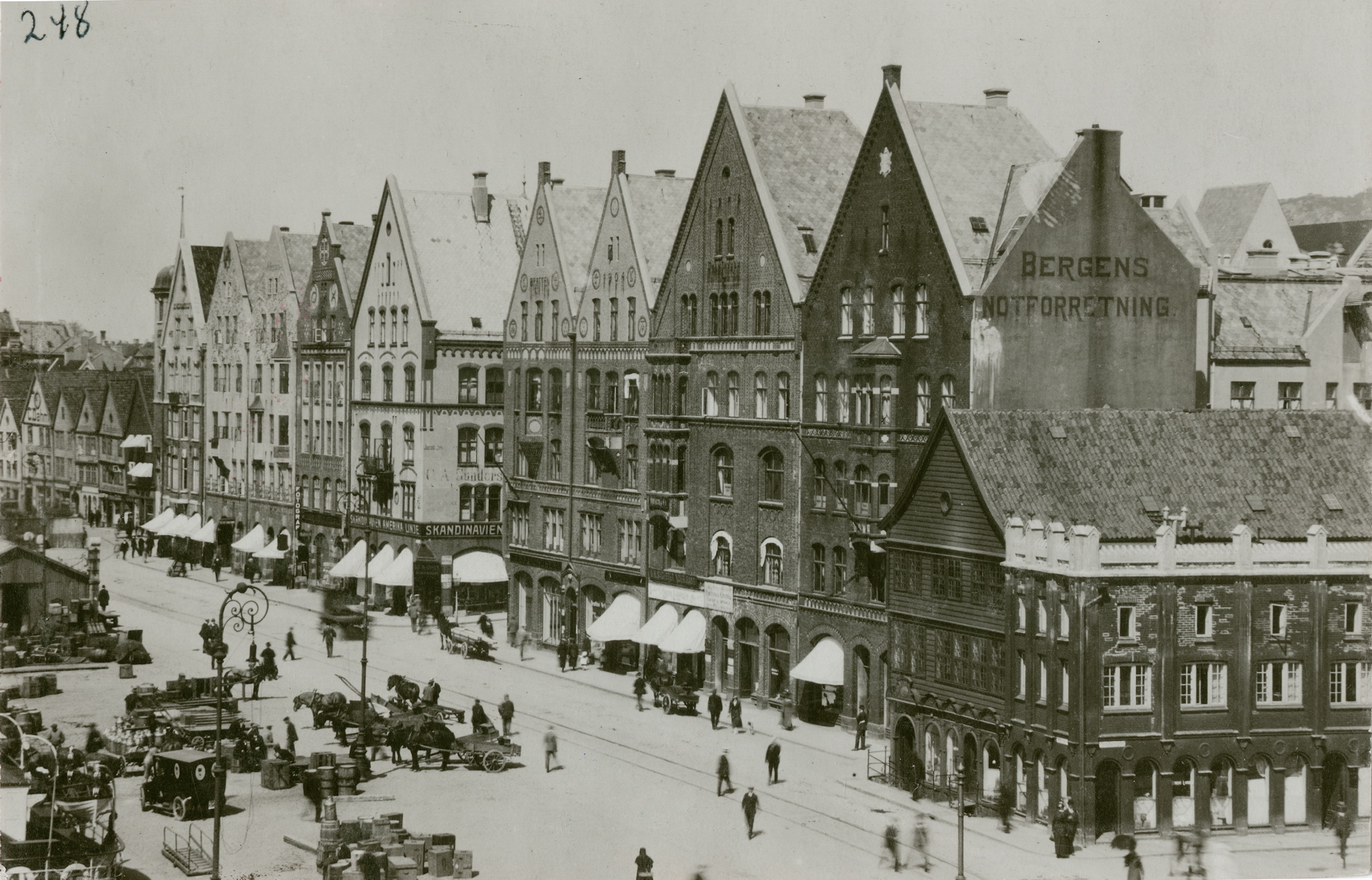 Bergen